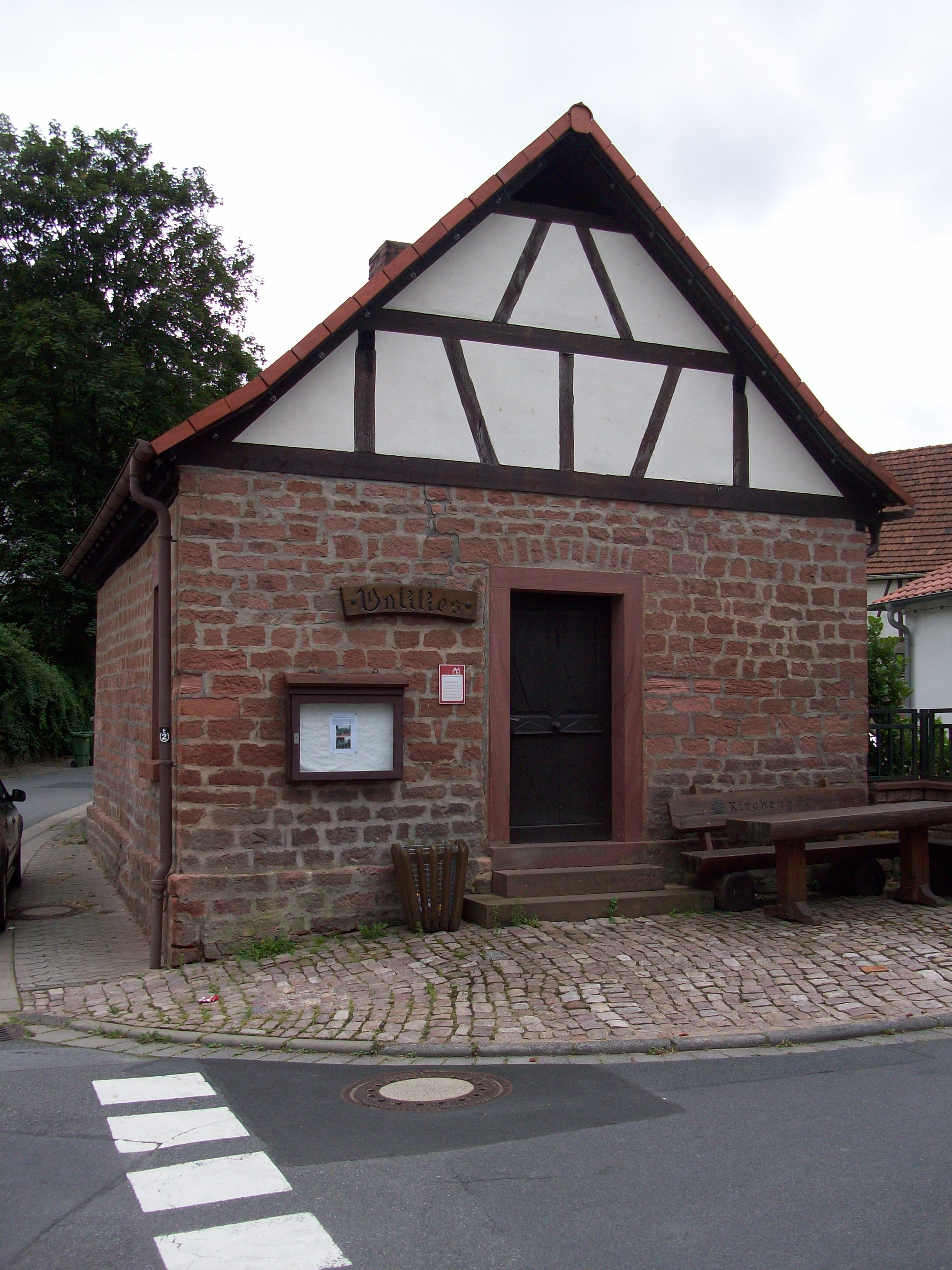 Das Bakkes in Wald-Amorbach, Stadtteil von Breuberg - das alte Backhaus des Ortes